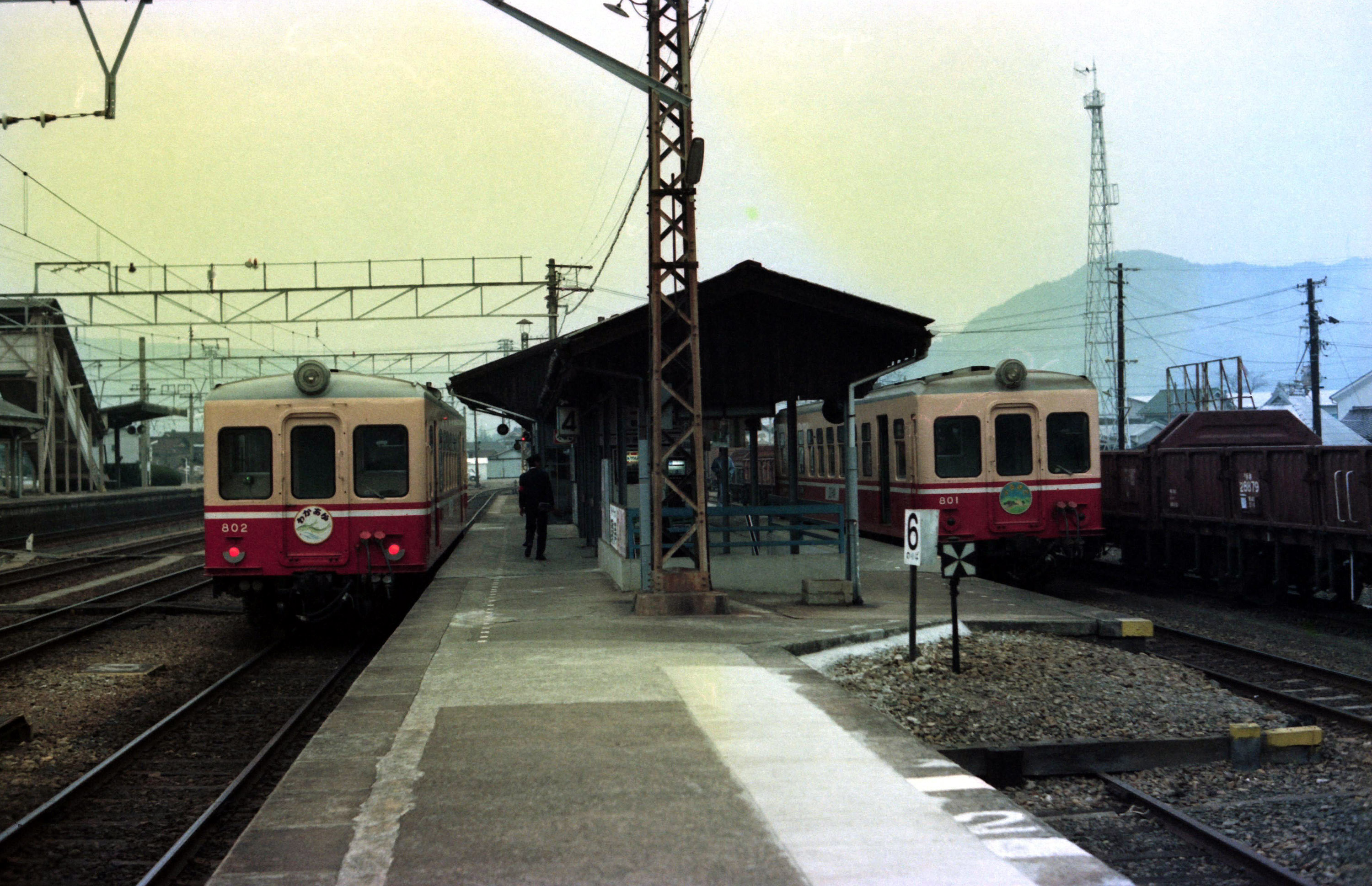 片上鉄道 和気駅 ホーム ８０２（わかあゆ）・８０１（ふるさと） Ｓ５６頃